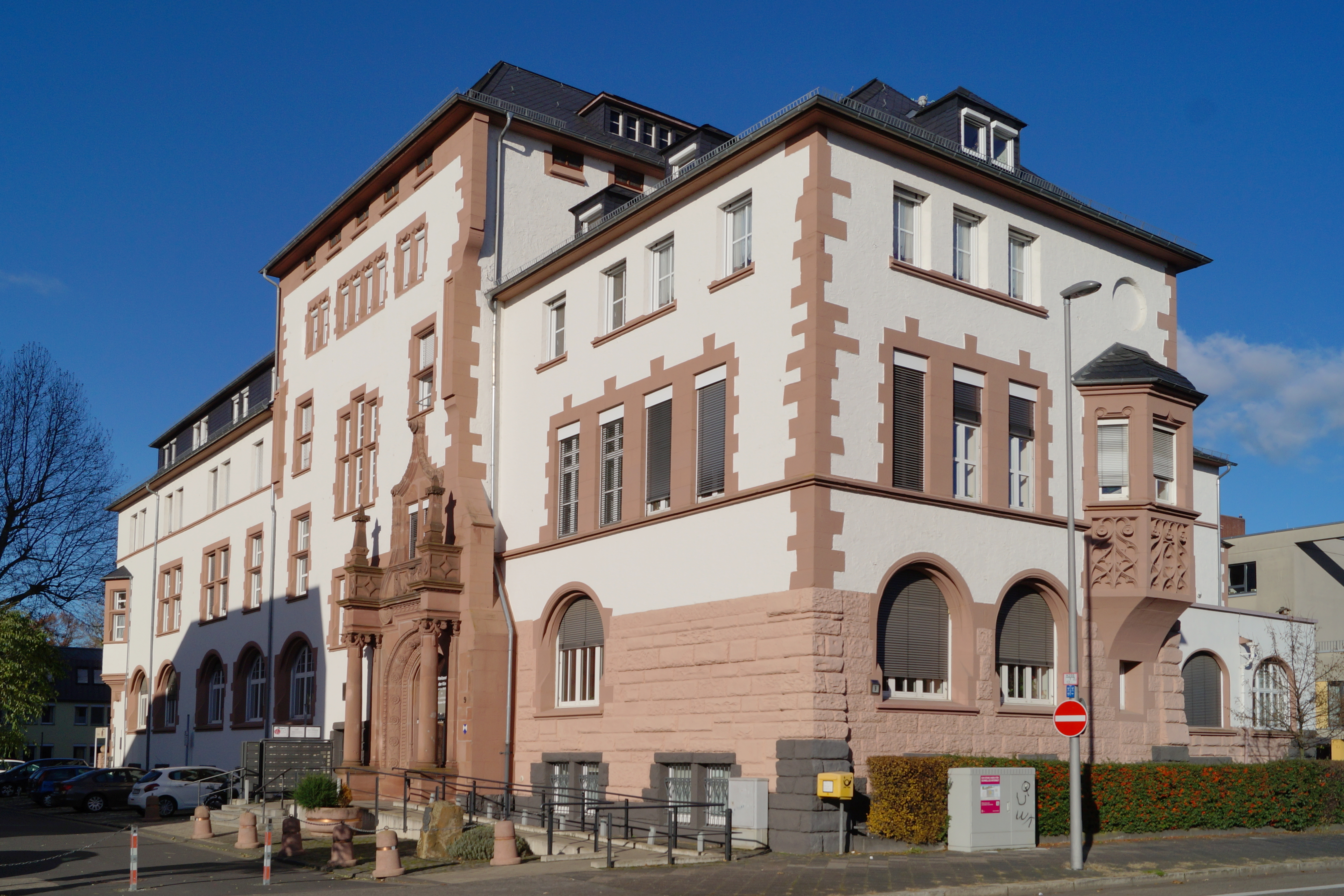 Ehemaliges Landratsamt in Hanau, Eugen-Kaiser-Straße 9